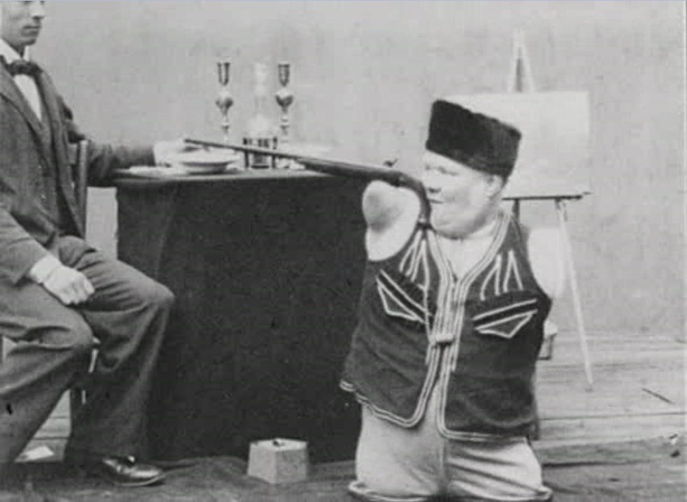 Documentaire de 1900 sur Kobelkoff